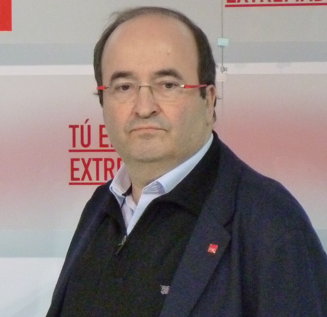 Guillermo Fernández Vara et Miquel Iceta à Mérida le 19 janvier 2017.